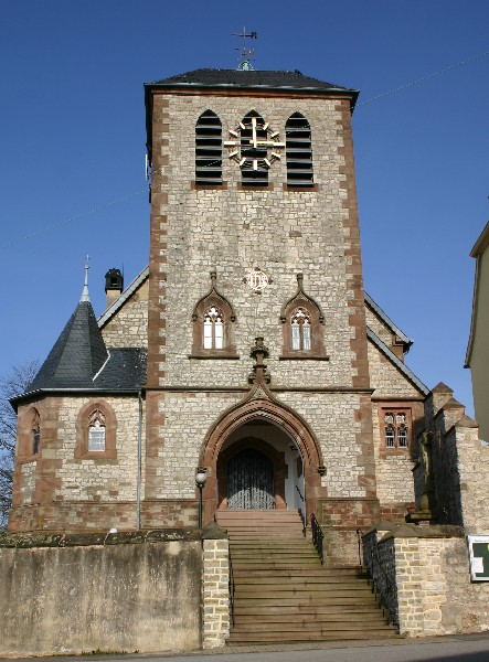 kath. Pfarrkirche St. Mauritius in Erfweiler-Ehlingen